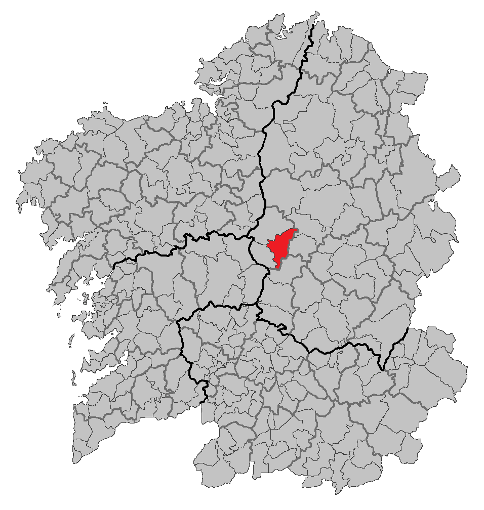 Mapa coa localización do concello de Monterroso.